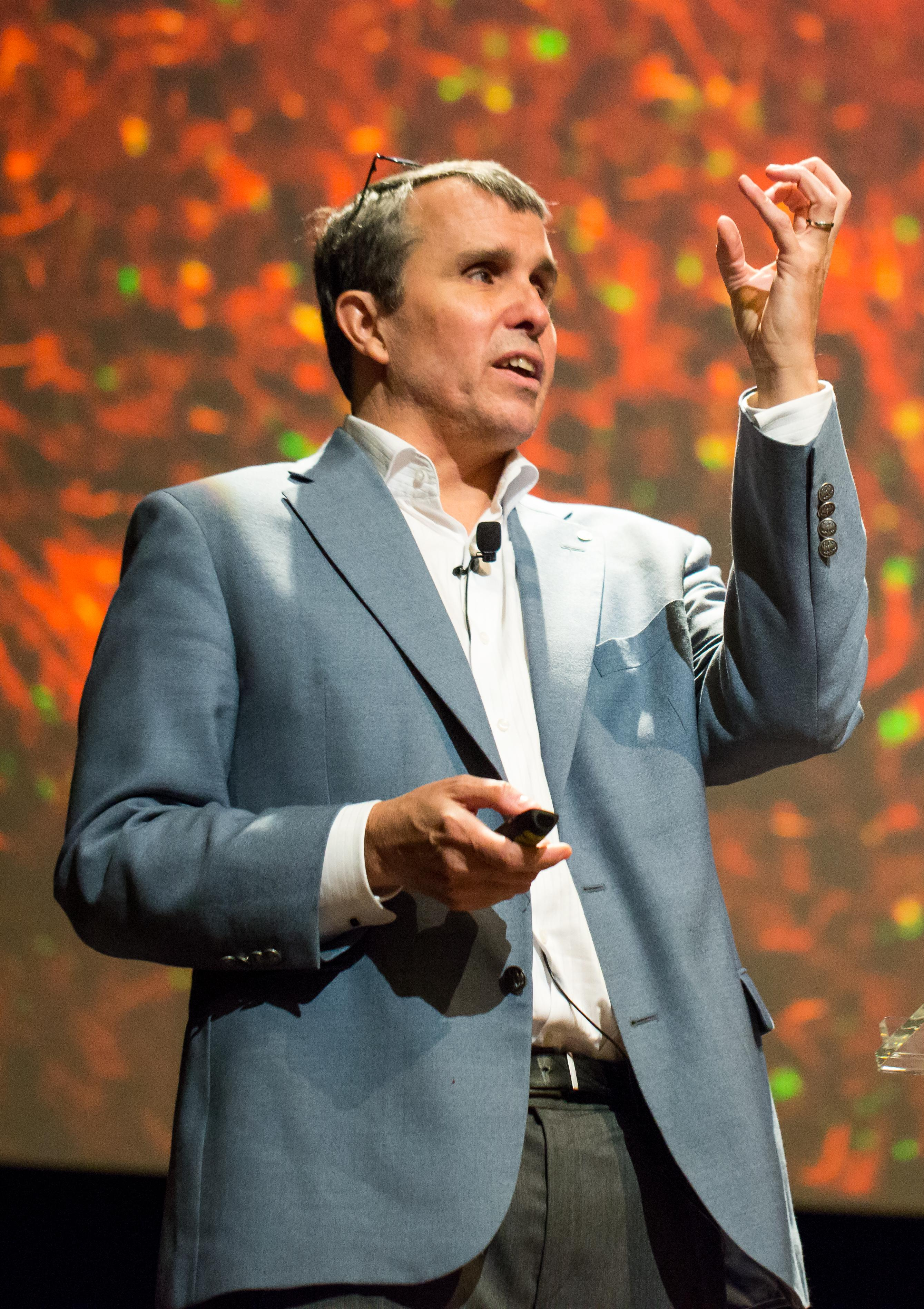 Eric Betzig , prix Nobel de chimie 2014, a donné une conférence à l’École polytechnique sur le thème de l’imagerie à haute résolution spatio-temporelle